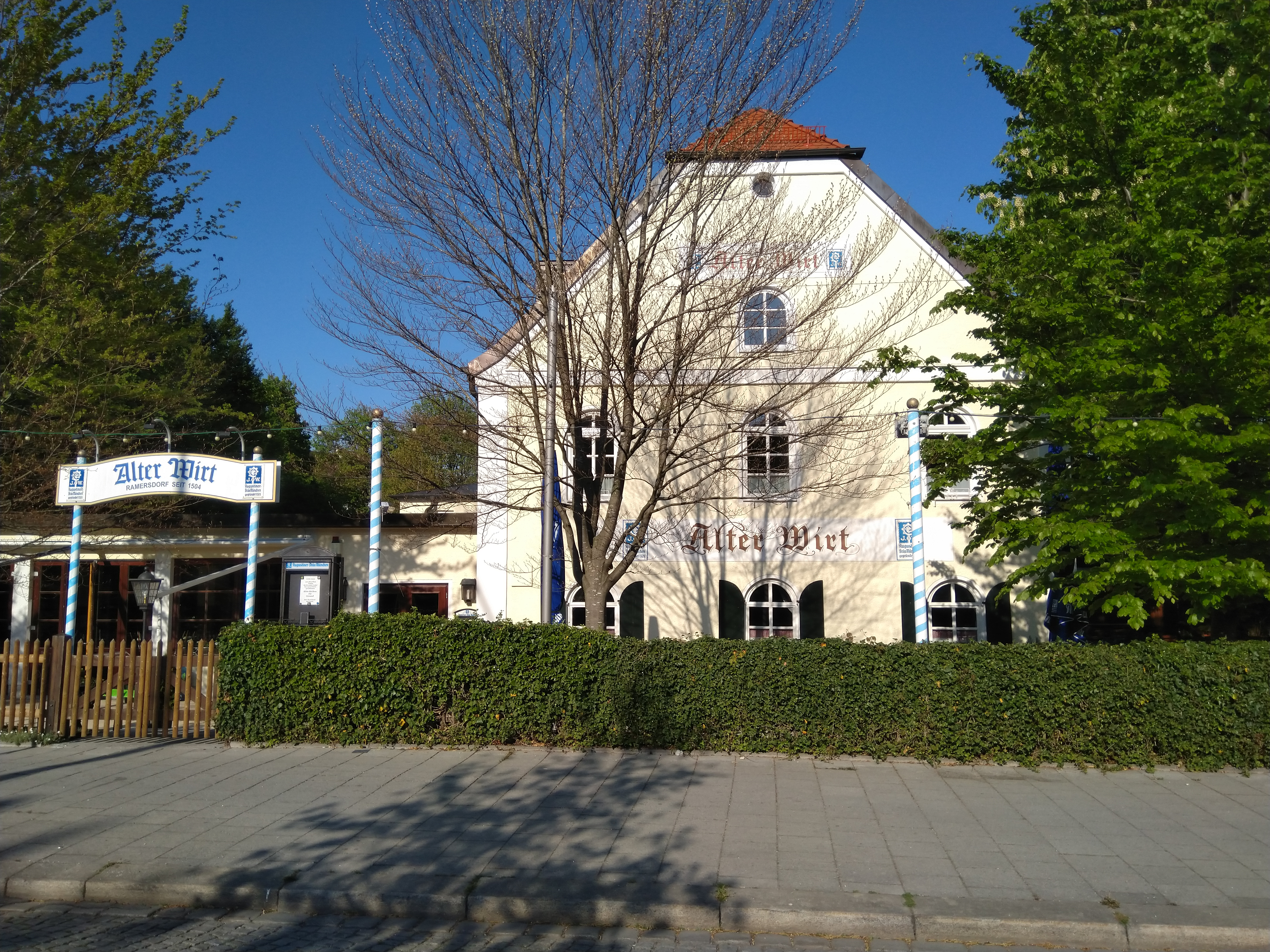 Frontalansicht vom Alten Wirt in Ramersdorf